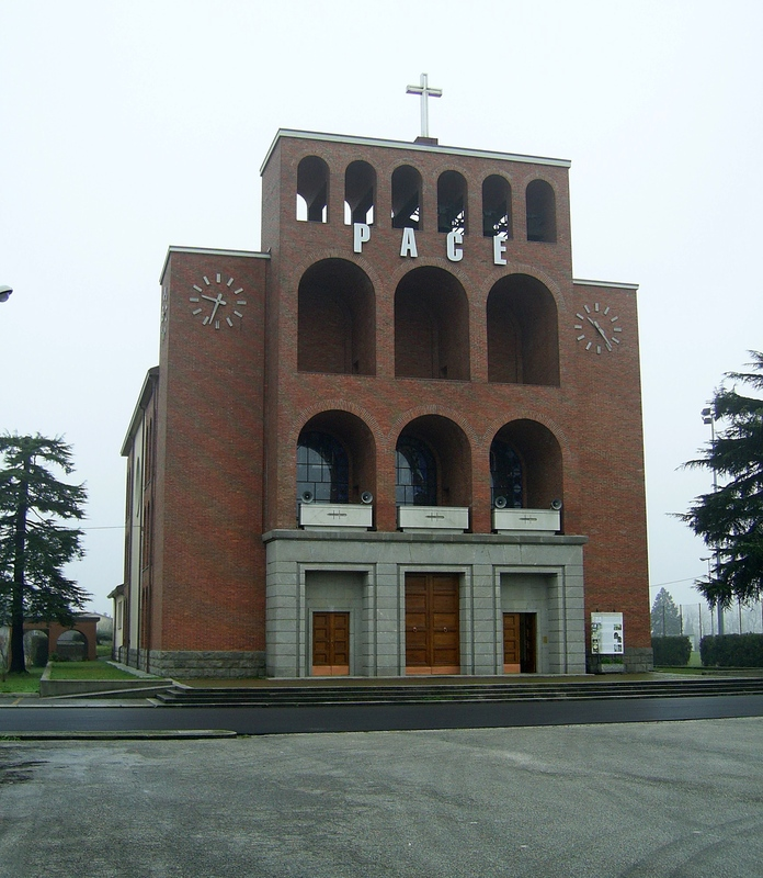 Tempio di Cargnacco dedicato ai caduti e dispersi italiani nella campagna di Russia